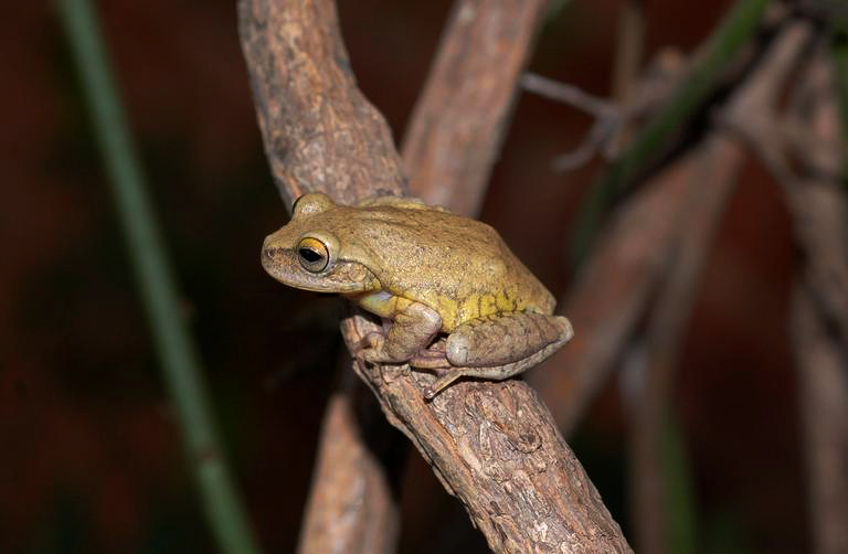 Bokermannohyla ibitiguara